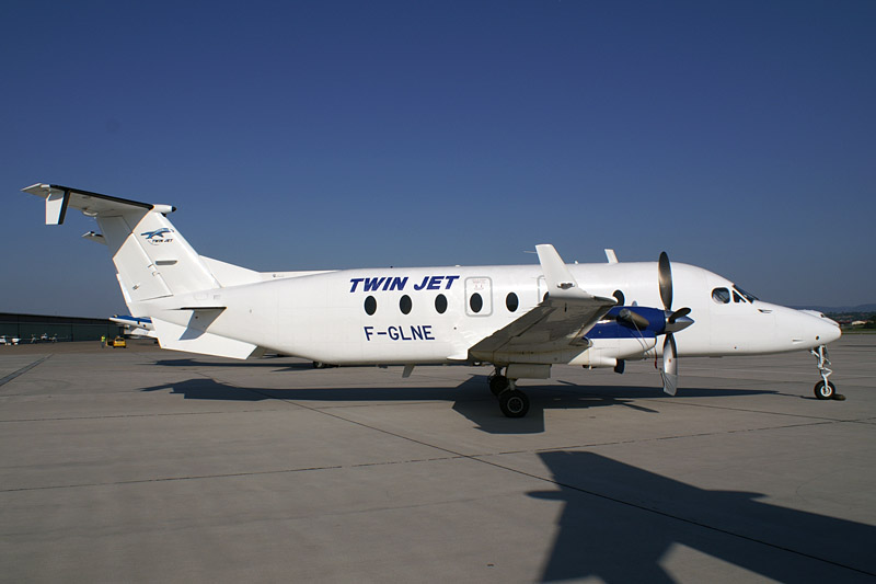 Twin Jet Beech 1900 F-GLNE